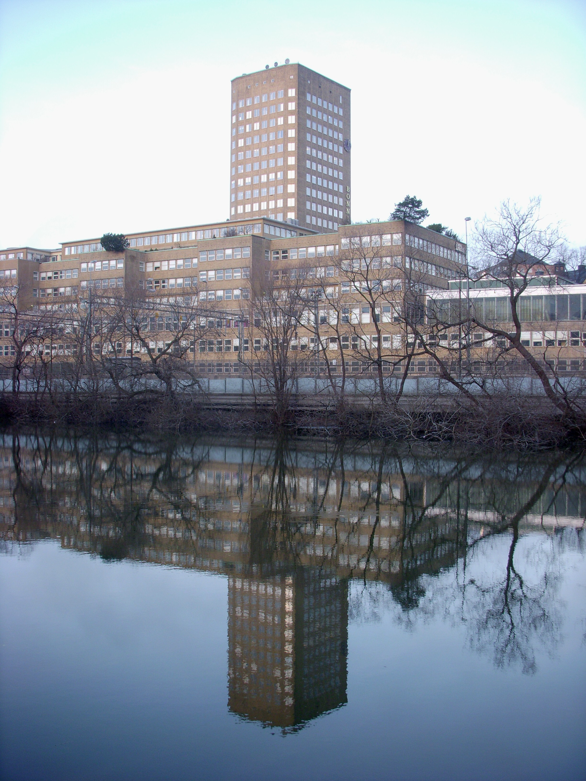 Bonnierhuset vid Torsgatan i Stockholm